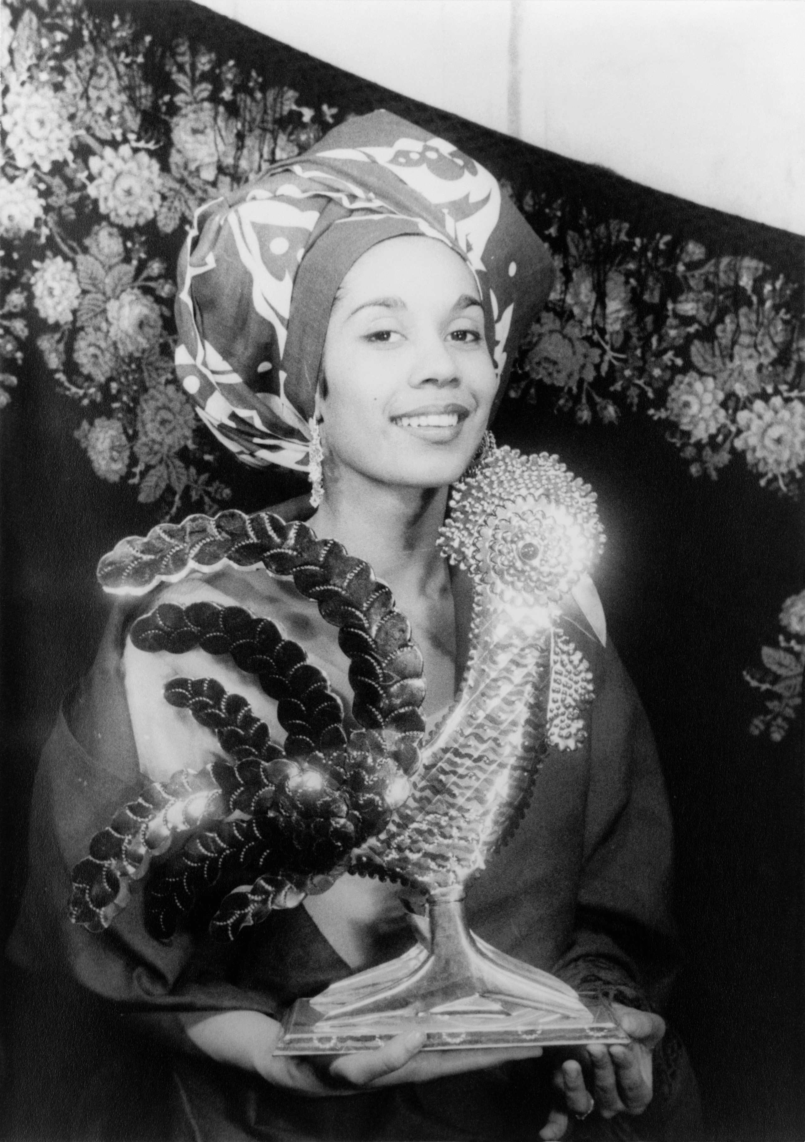 American dancer Carmen de Lavallade.